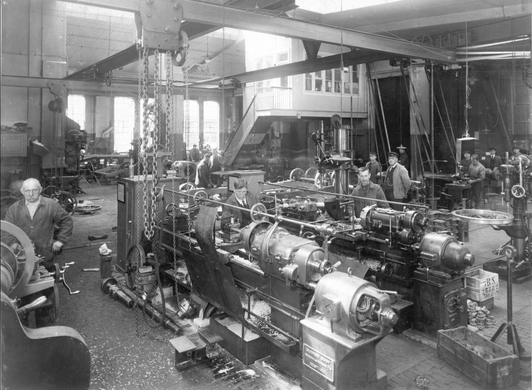 Verkstedet for Oslo Sporveier i Sporveisgata 8